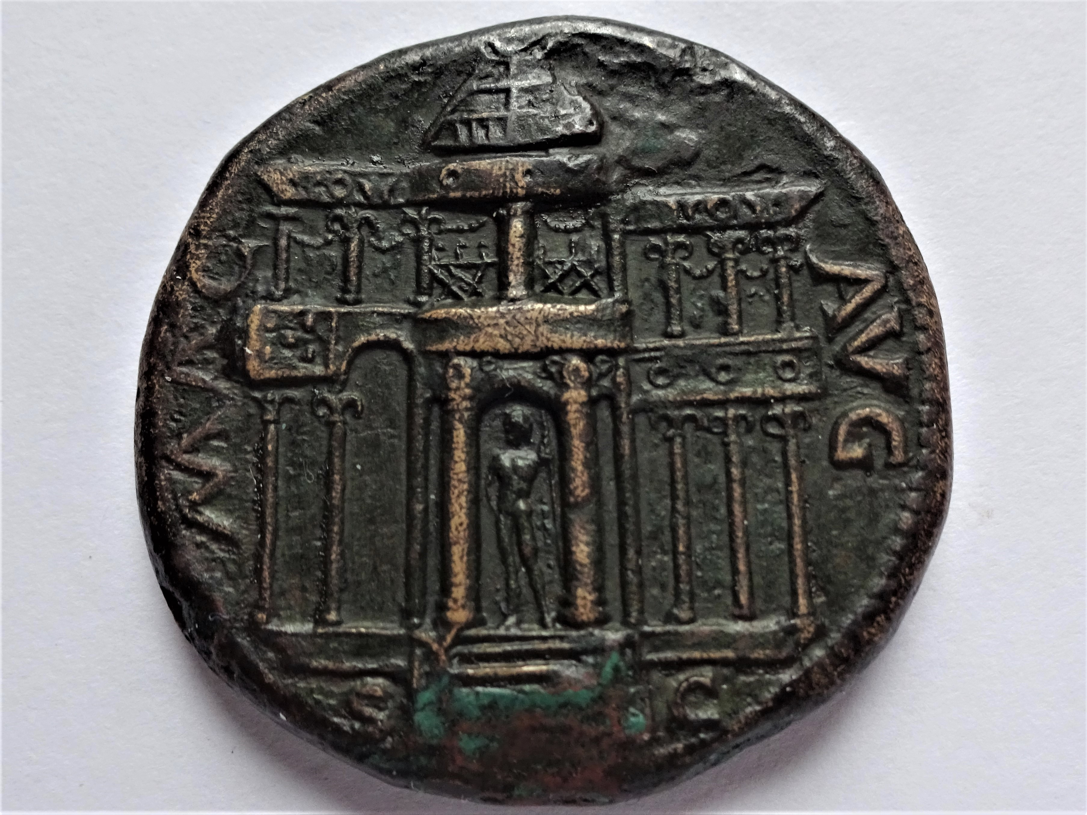 Rückseite Sesterz' des Nero mit dem Macellum, Kampmann Nr. 14.33